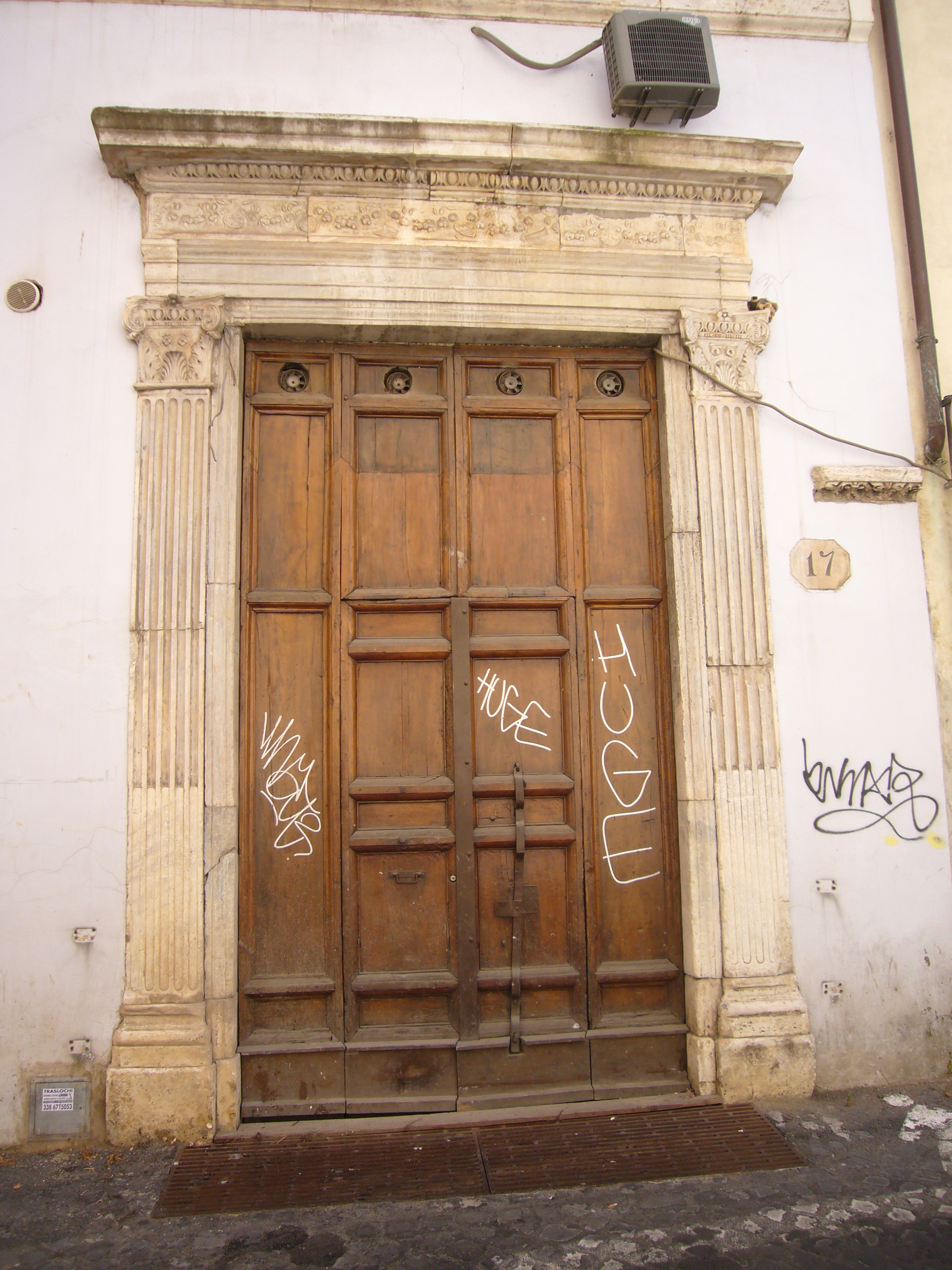 Roma, via degli Specchi, portone di palazzo degli Specchi.